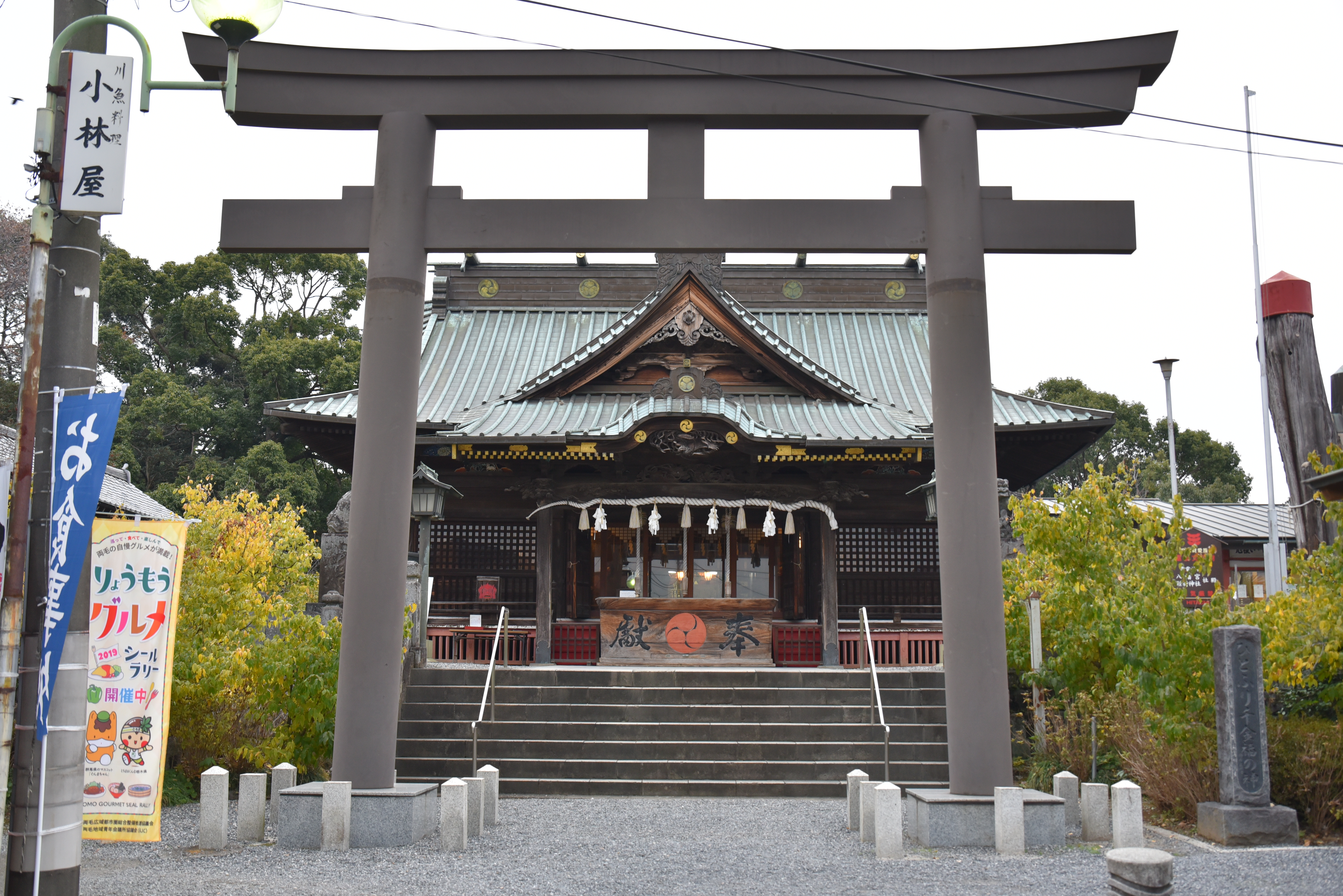 板倉雷電神社（群馬県板倉町）の二の鳥居 Nikon D750